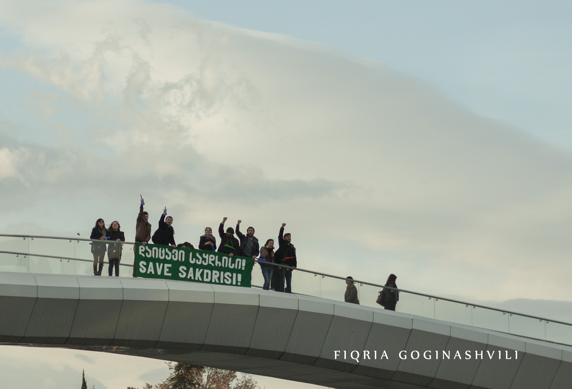 IMG_2843_1686 copy